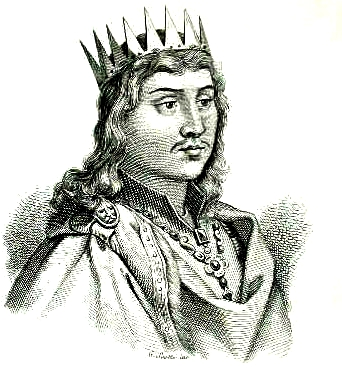 Flavio Ildebrando. Re dei Longobardi